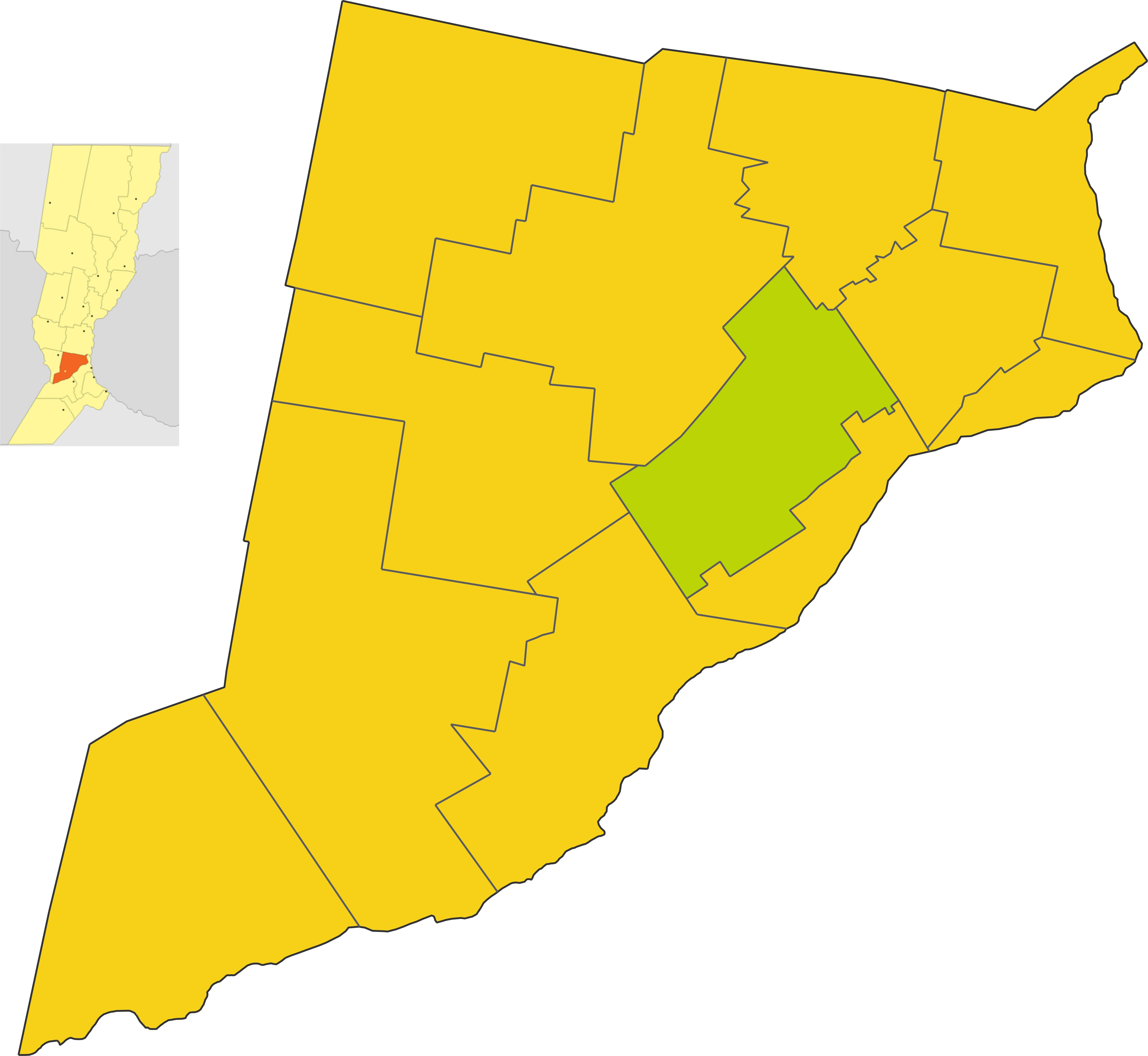 Map of the comuna de Salto Grande in Iriondo department, Santa fe province, Argentina